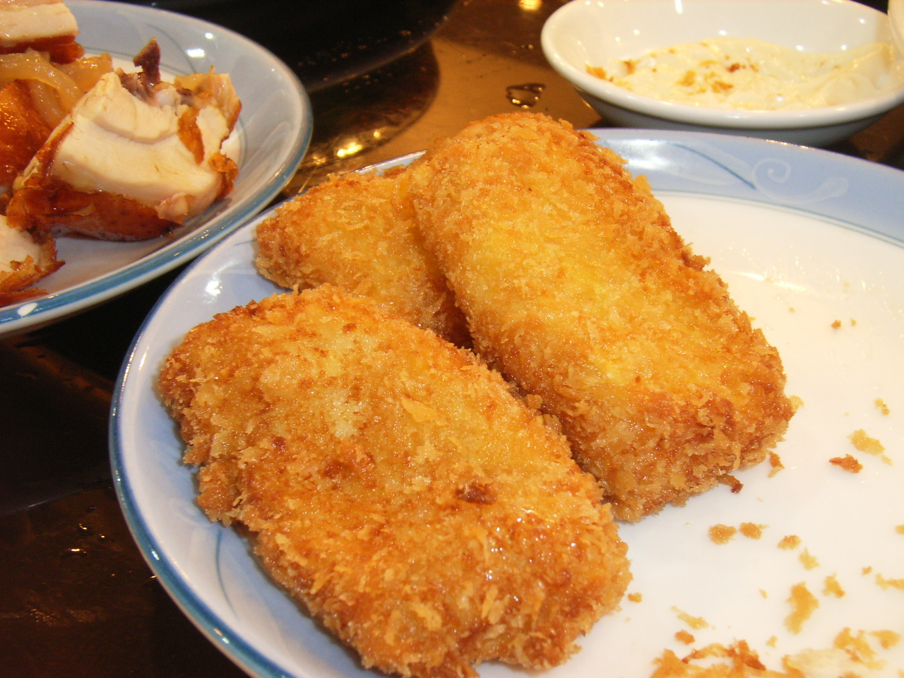 沙拉炸卷: 是zh:香港和zh:澳門地區的zh:酒樓常見小菜。